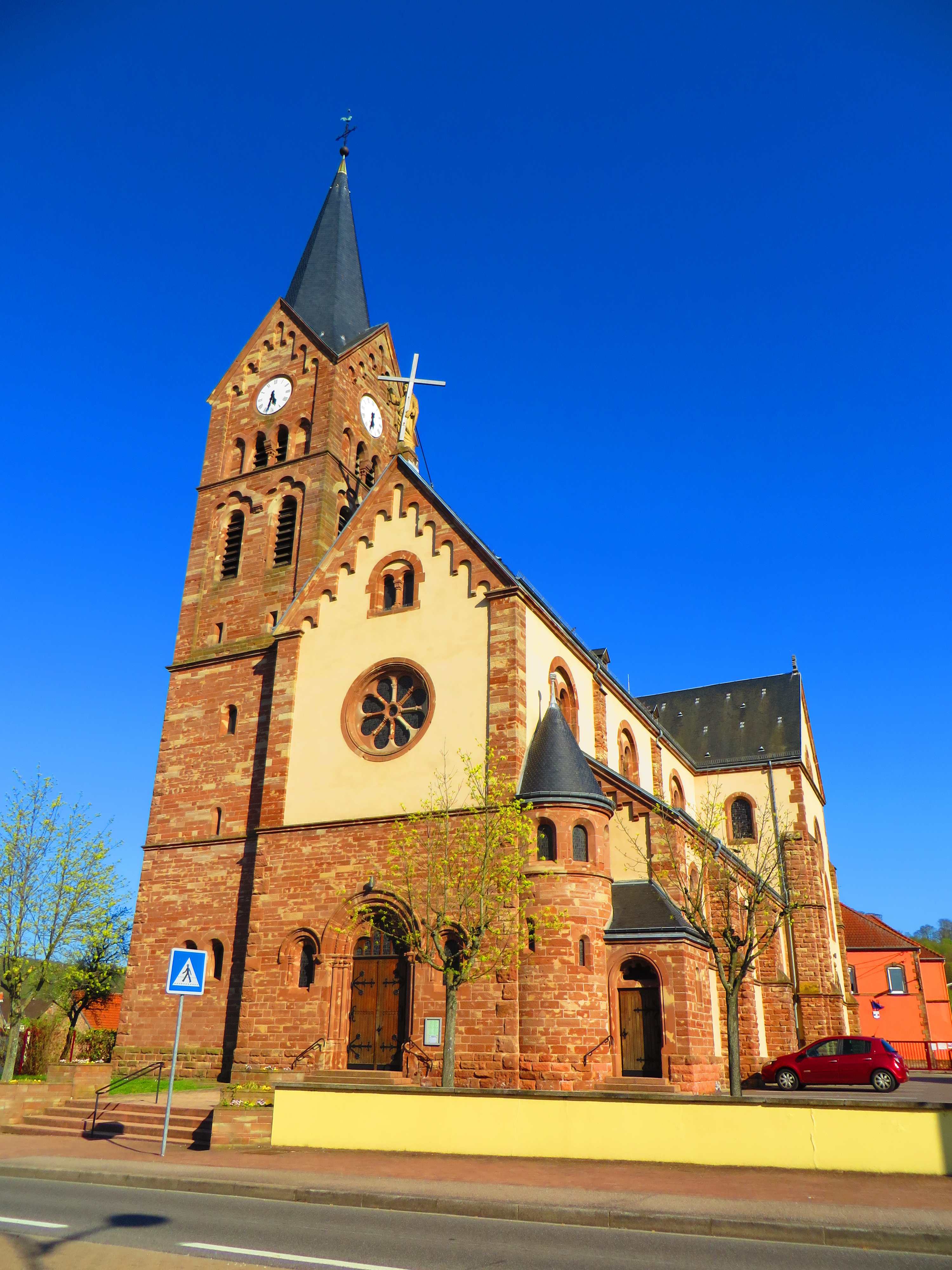 Morsbach eglise